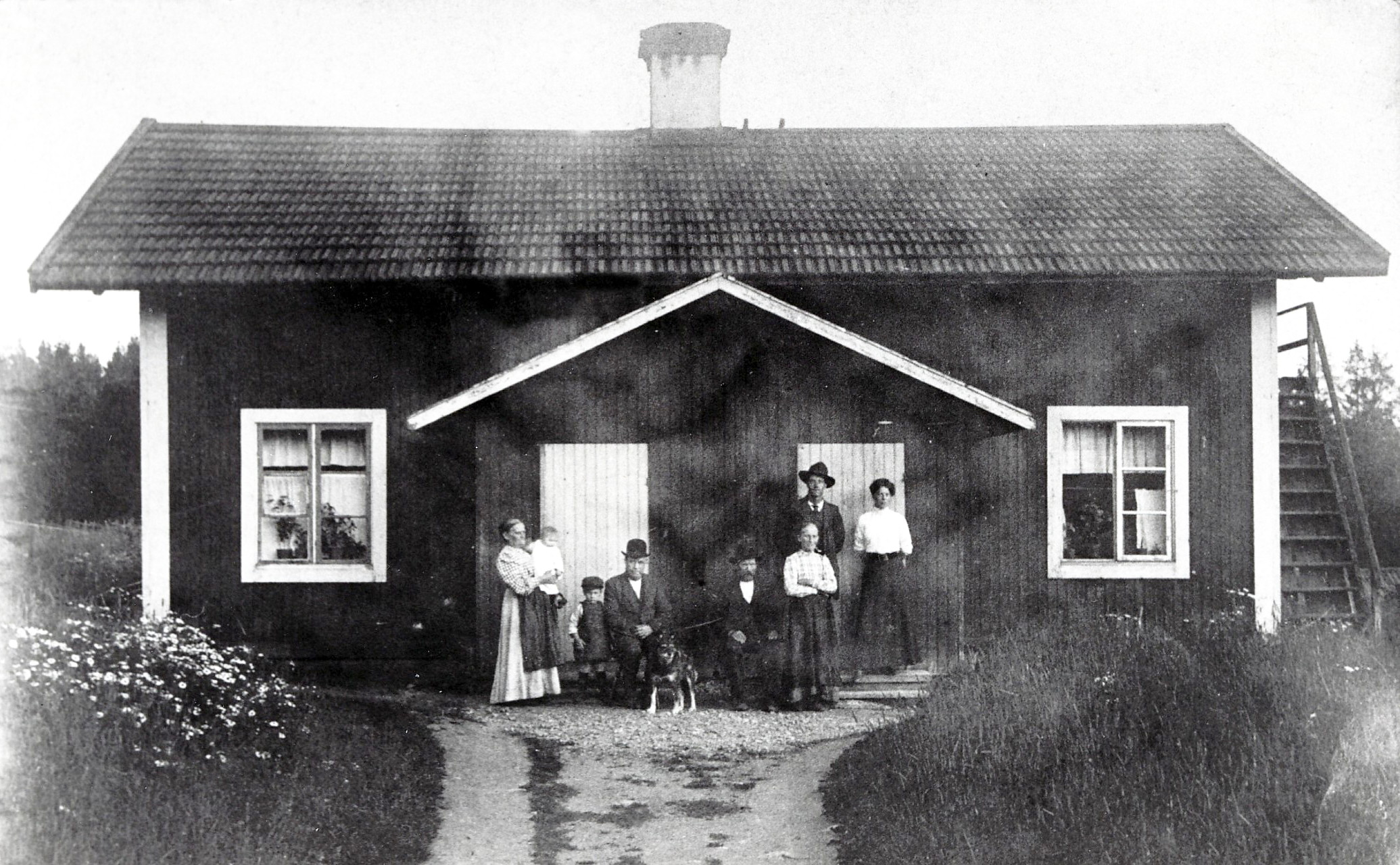 Dammvaktarbostället Stenberget